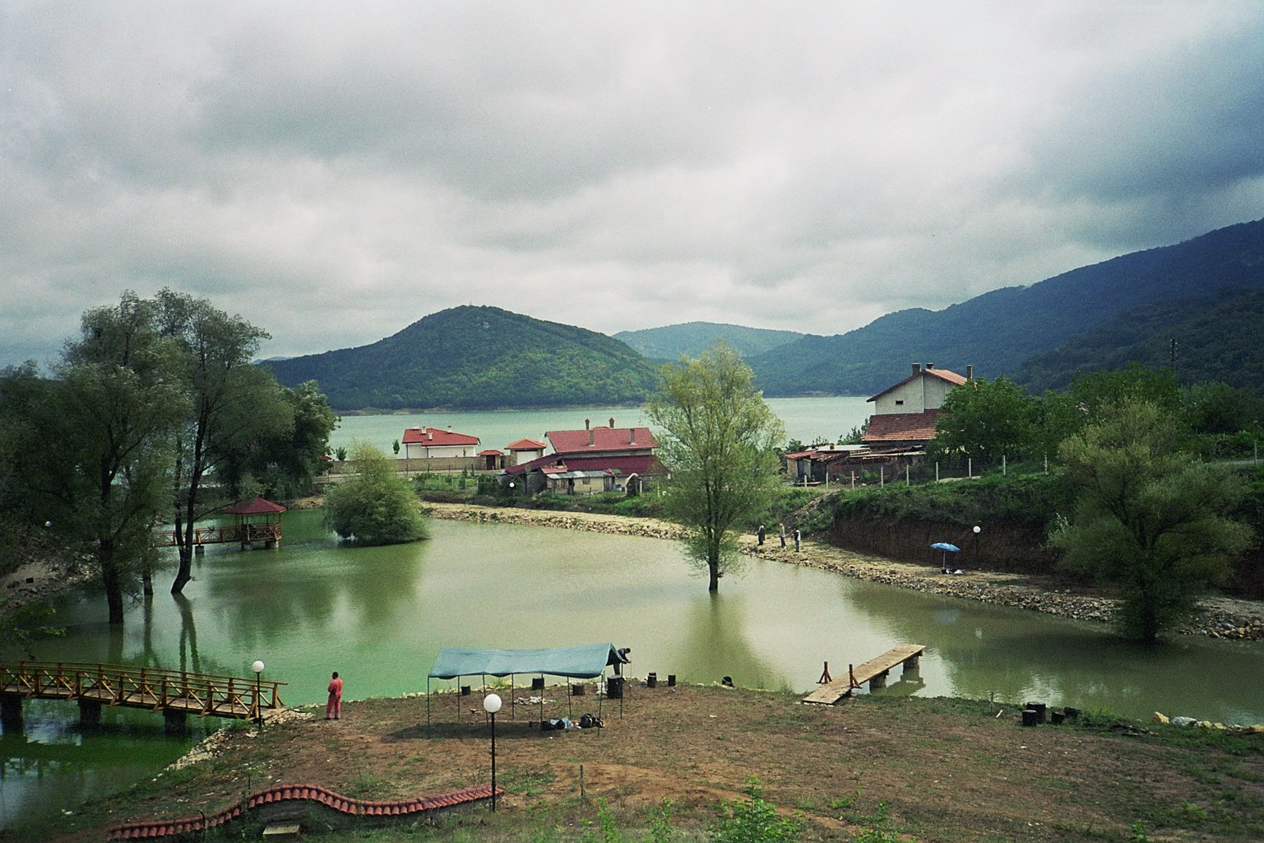 Tsonevo Reservoir, Bulgaria